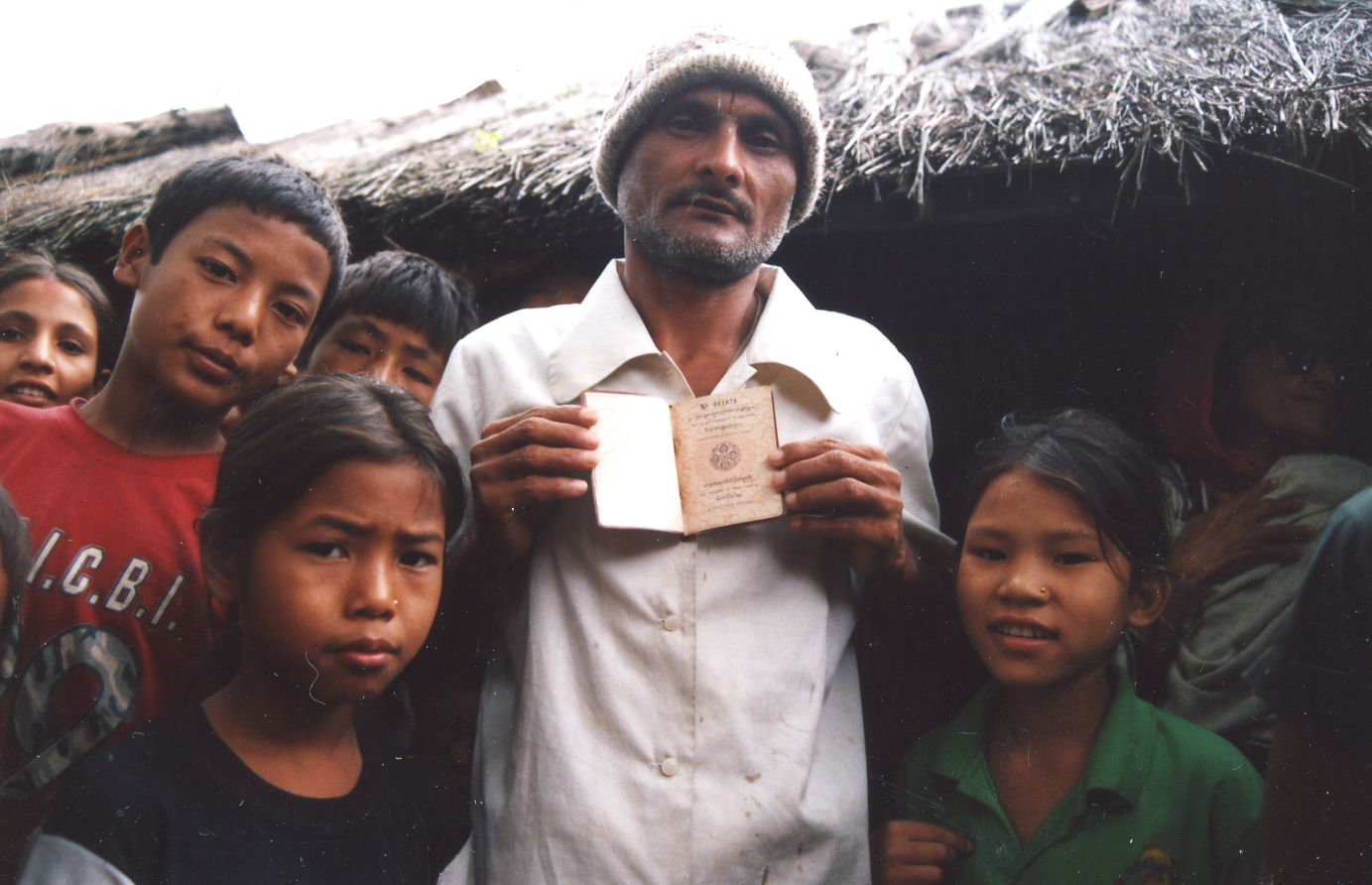 Lotshampa refugees in Beldangi Camp